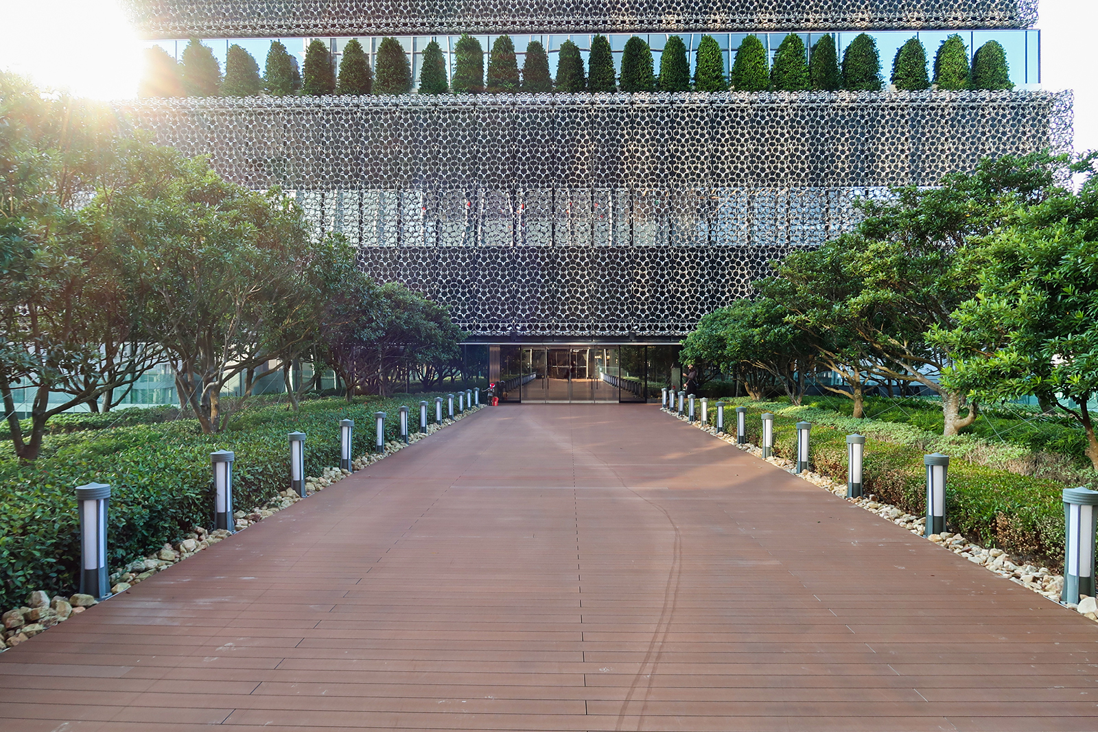 Taipei Nan Shan Plaza